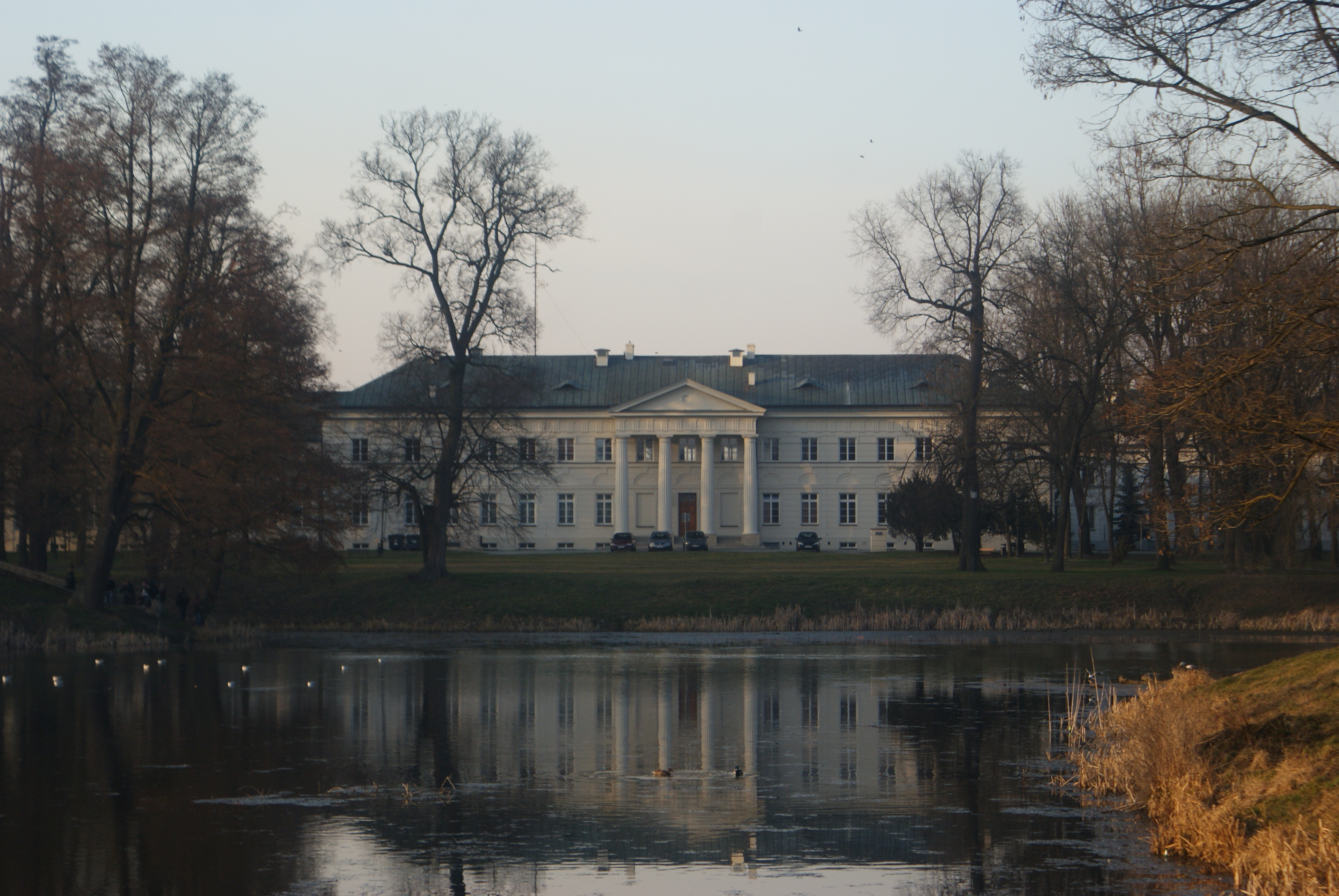 Dęblin, zespół pałacowy, XVIII